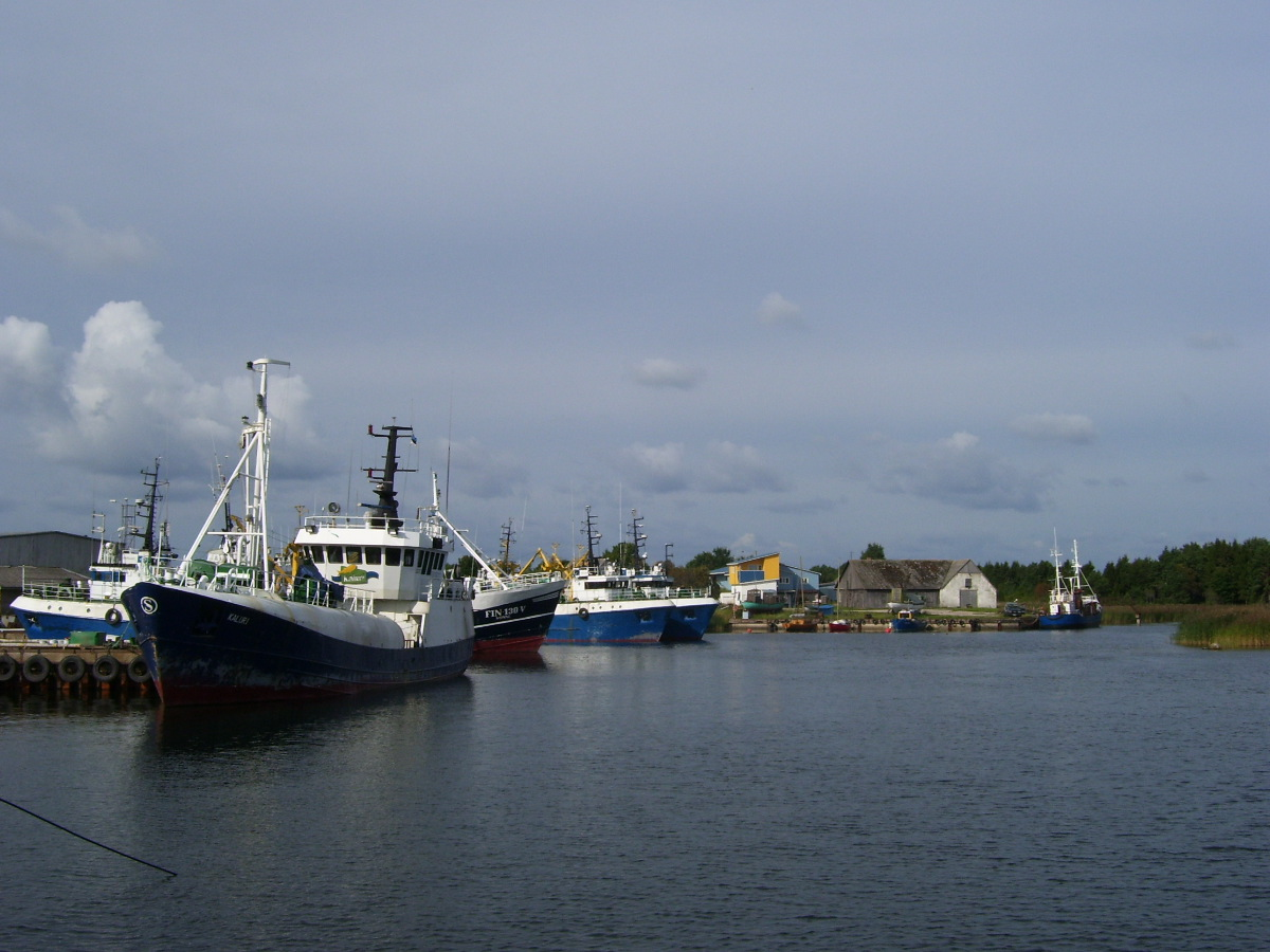 Vaade Suursadamale "Piirivalvekailt"